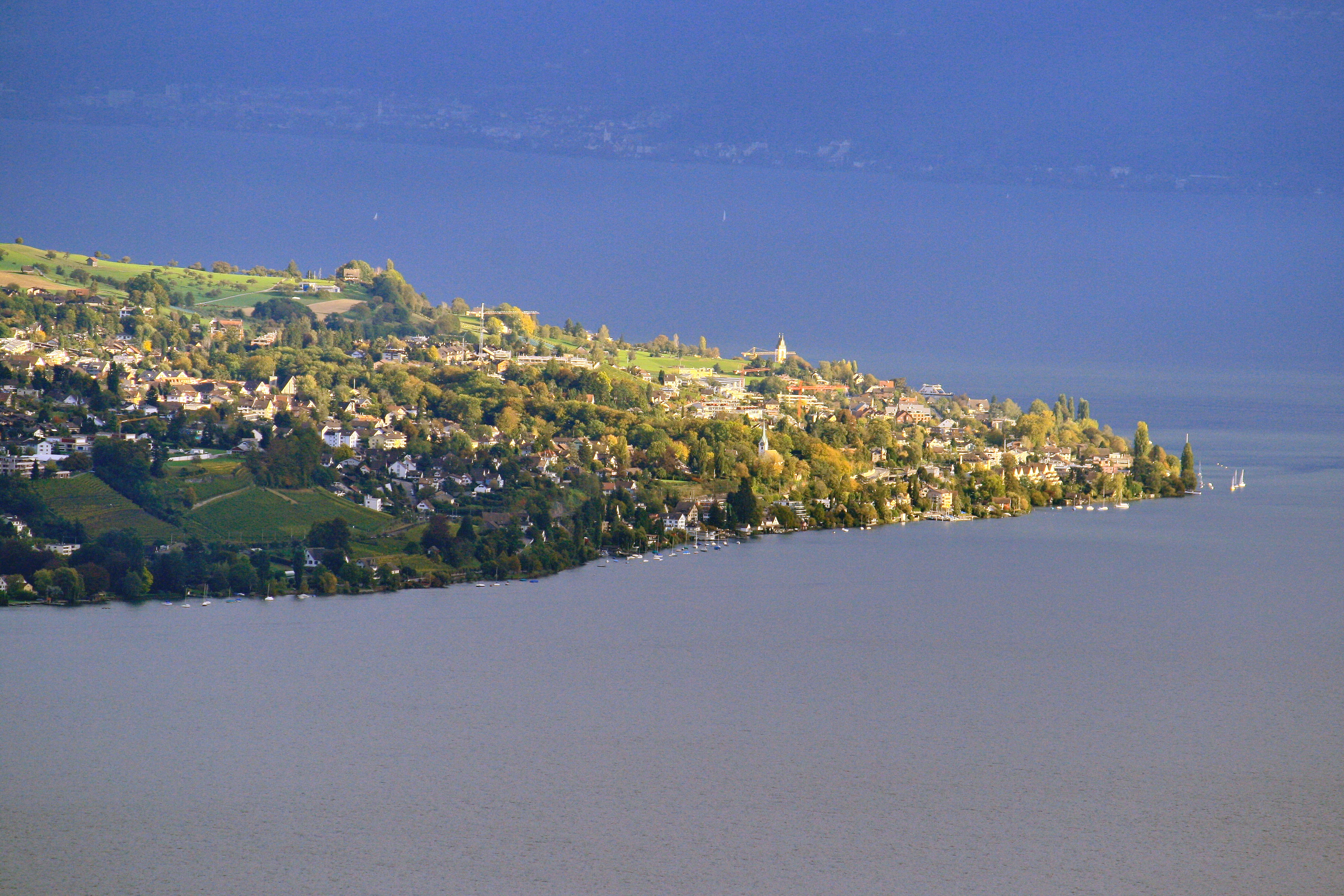 Herrliberg (first church) and Meilen (church in the background) on Zürichsee (Lake Zürich) as seen from Uetliberg Aussichtsturm